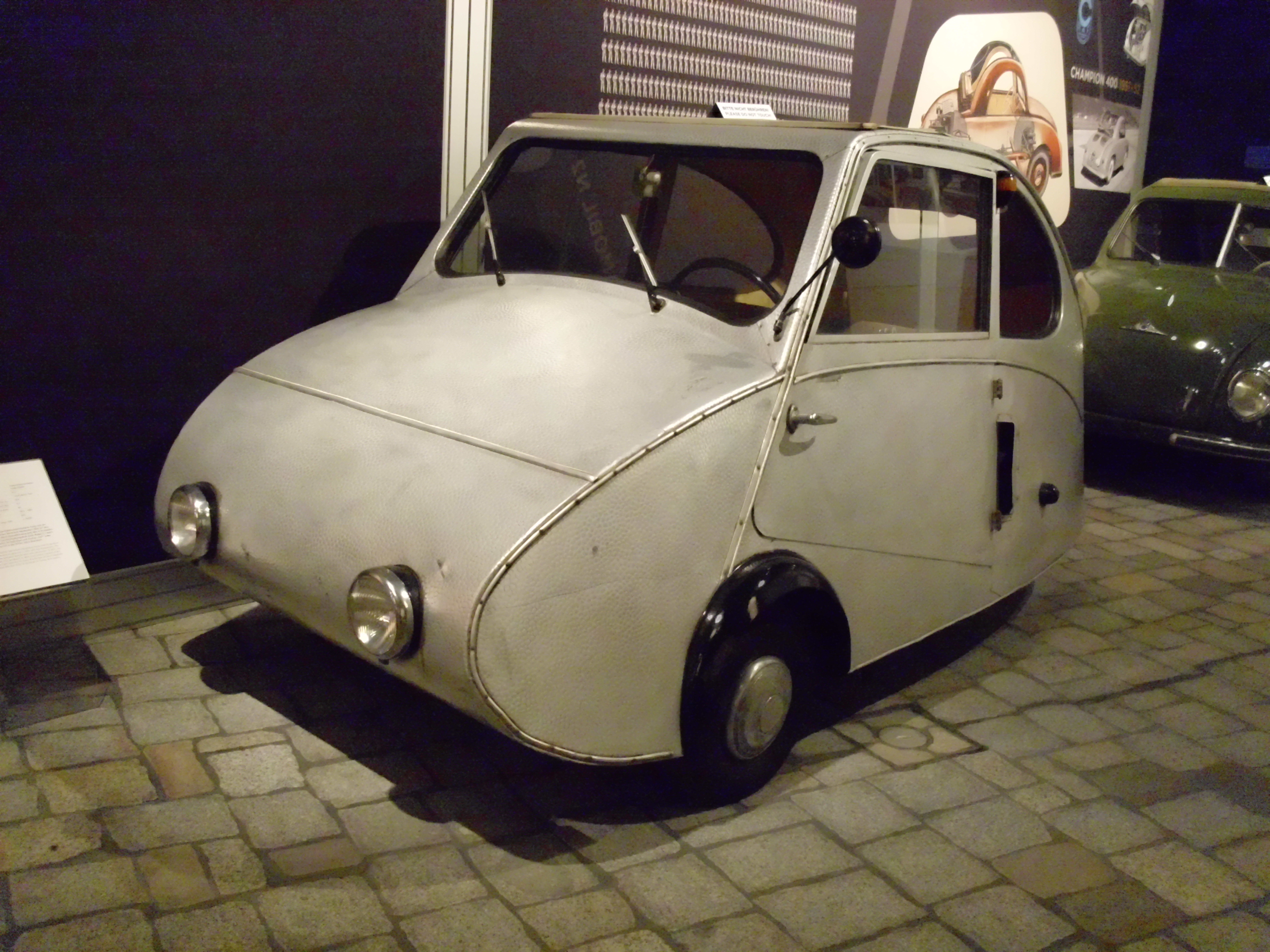 Fuldamobil N-2 1952-1955